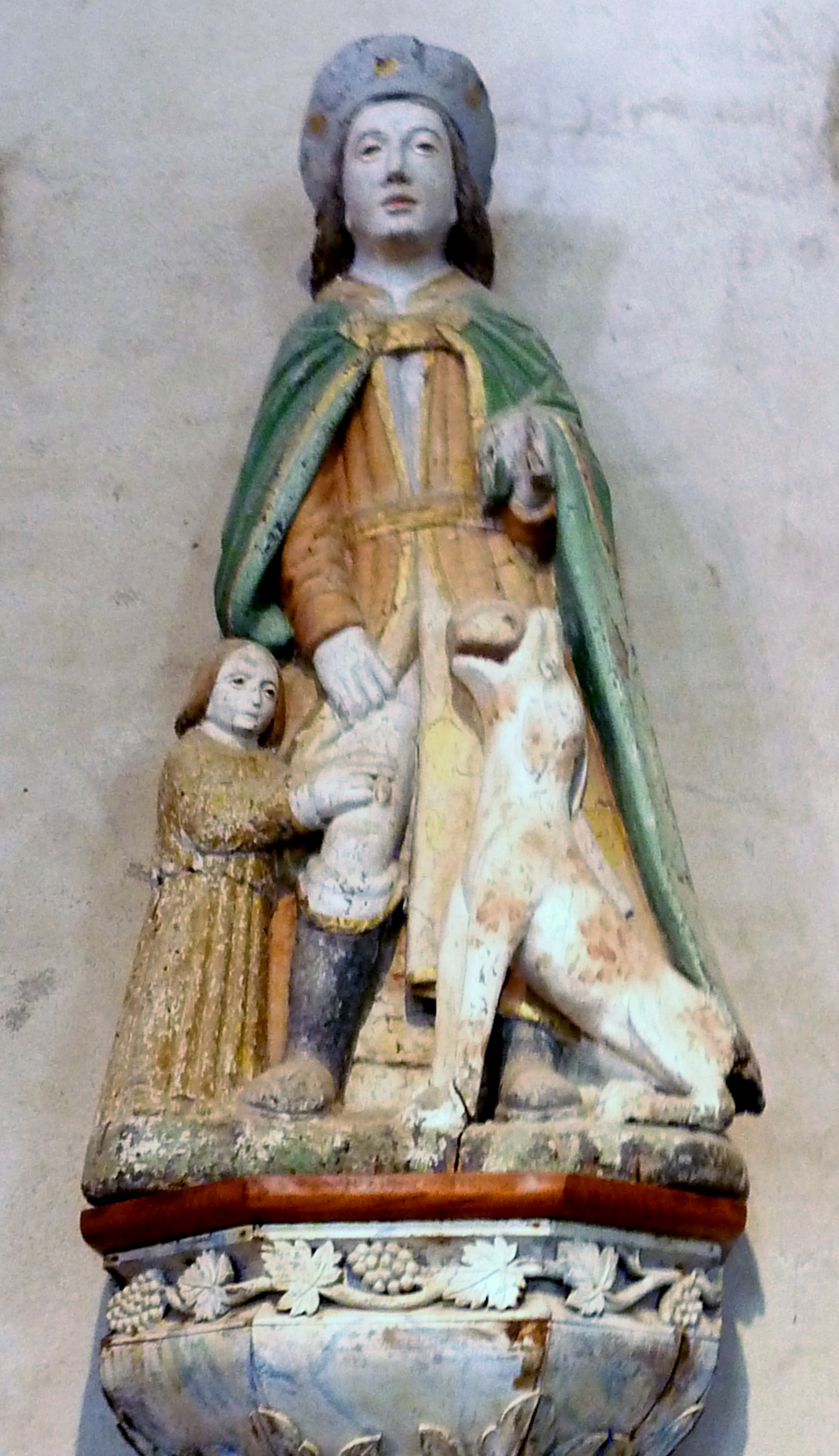 Laz : église paroissiale Saint-Germain et Saint-Louis, statue de saint Roch (bois polychrome du XVIe siècle). La statue représente des éléments de la légende de ce saint : les bubons de la peste, l'ange et le chien.